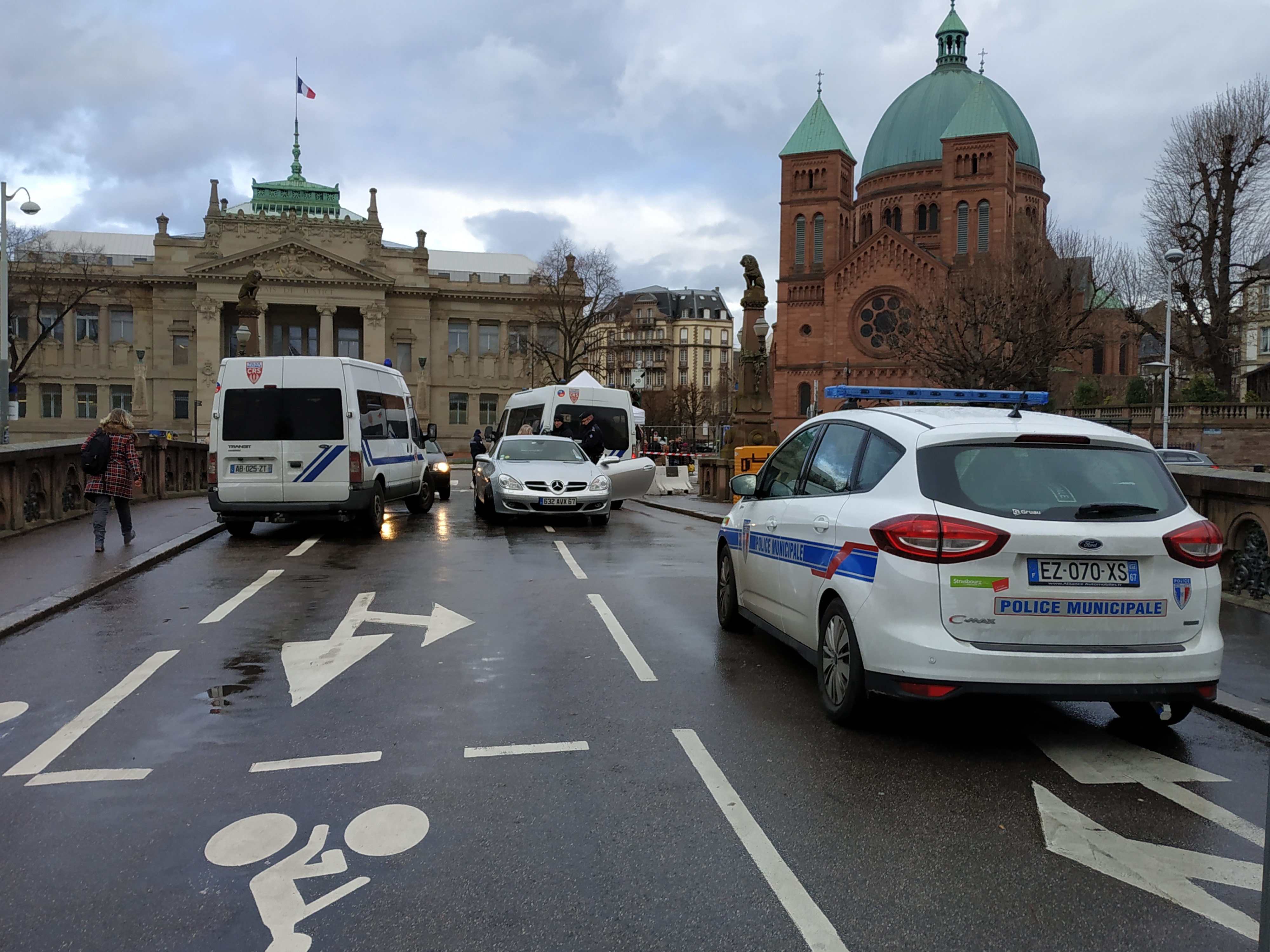 Fouille d'un véhicule par la police municipale et CRS à un des checkpoints du marché de Noël de Strasbourg en 2018